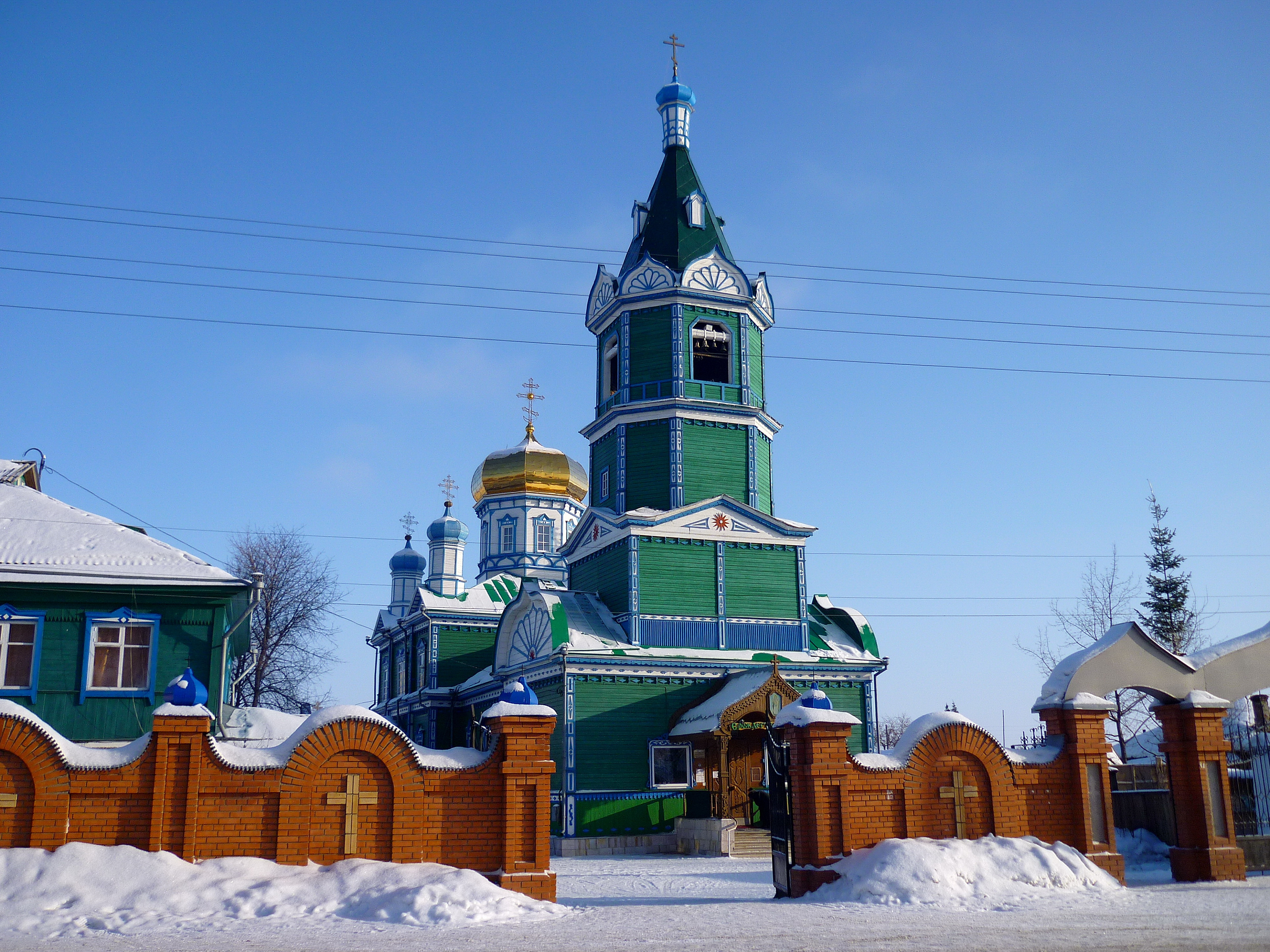 Михаило-Архангельская церковь (Алтайский край, Рубцовск, Советская улица, 9)